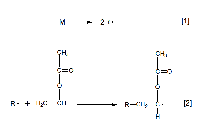 Equações relacionadas a etapa de iniciação